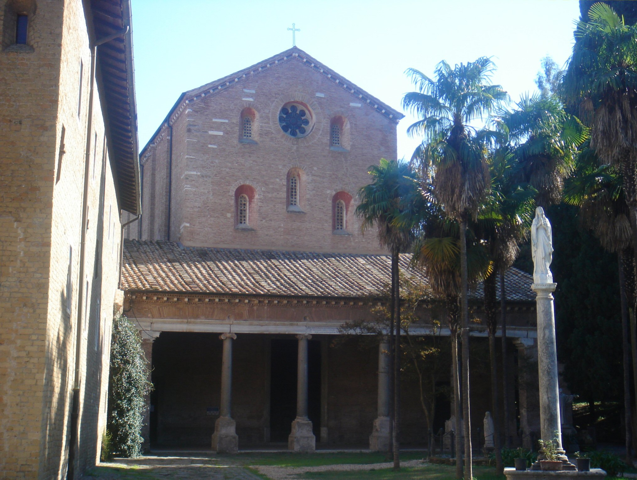 Roma, Abbazia delle Tre Fontane: chiesa abbaziale dei santi Vincenzo e Anastasio